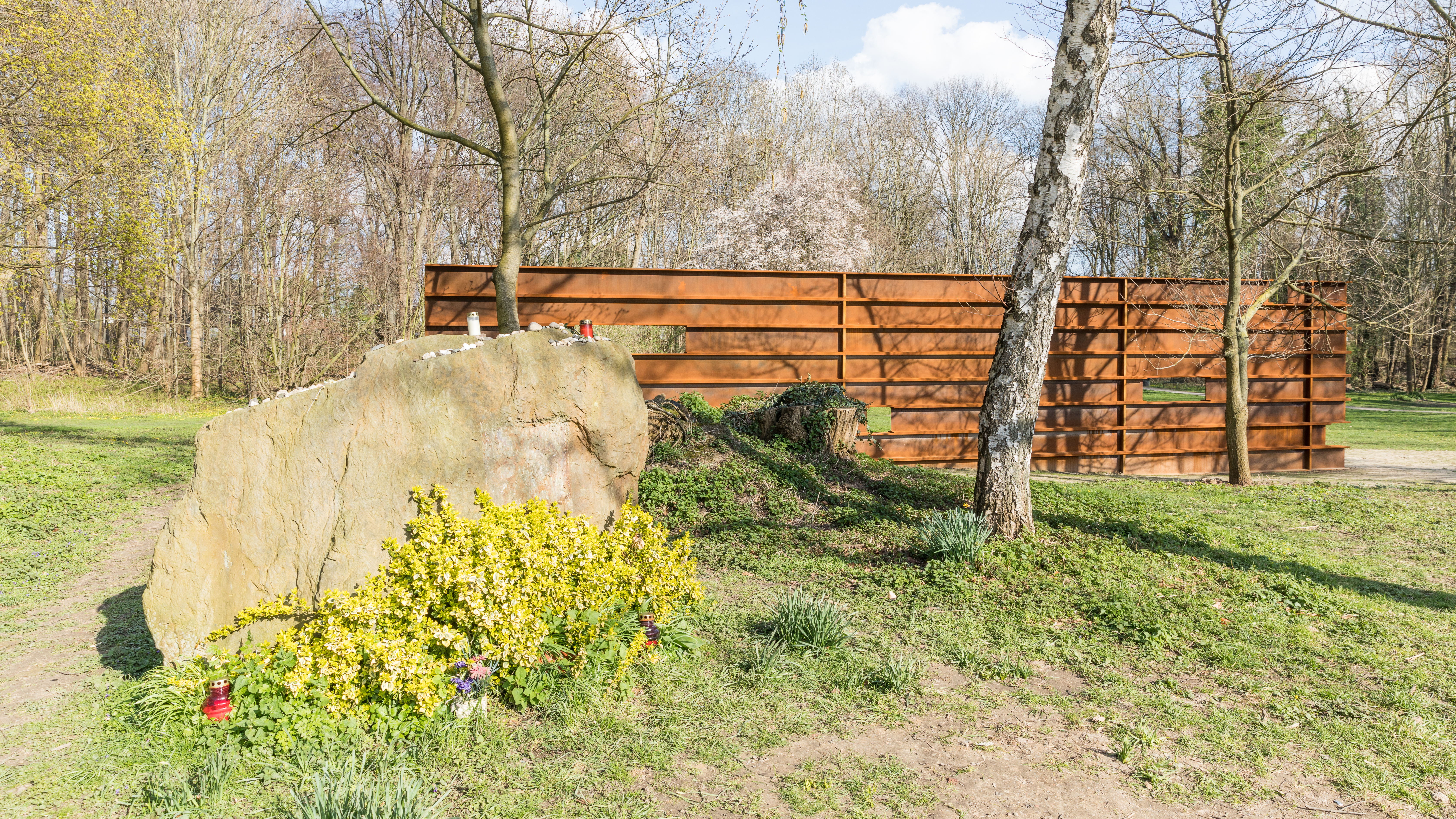 Gedenkort an das Deportationslager Köln-Müngersdorf. Skulptur aus Cortenstrahl nach einem Entwurf des Kölner Architekten Simon Ungers. Posthum errichtet im Januar 2020